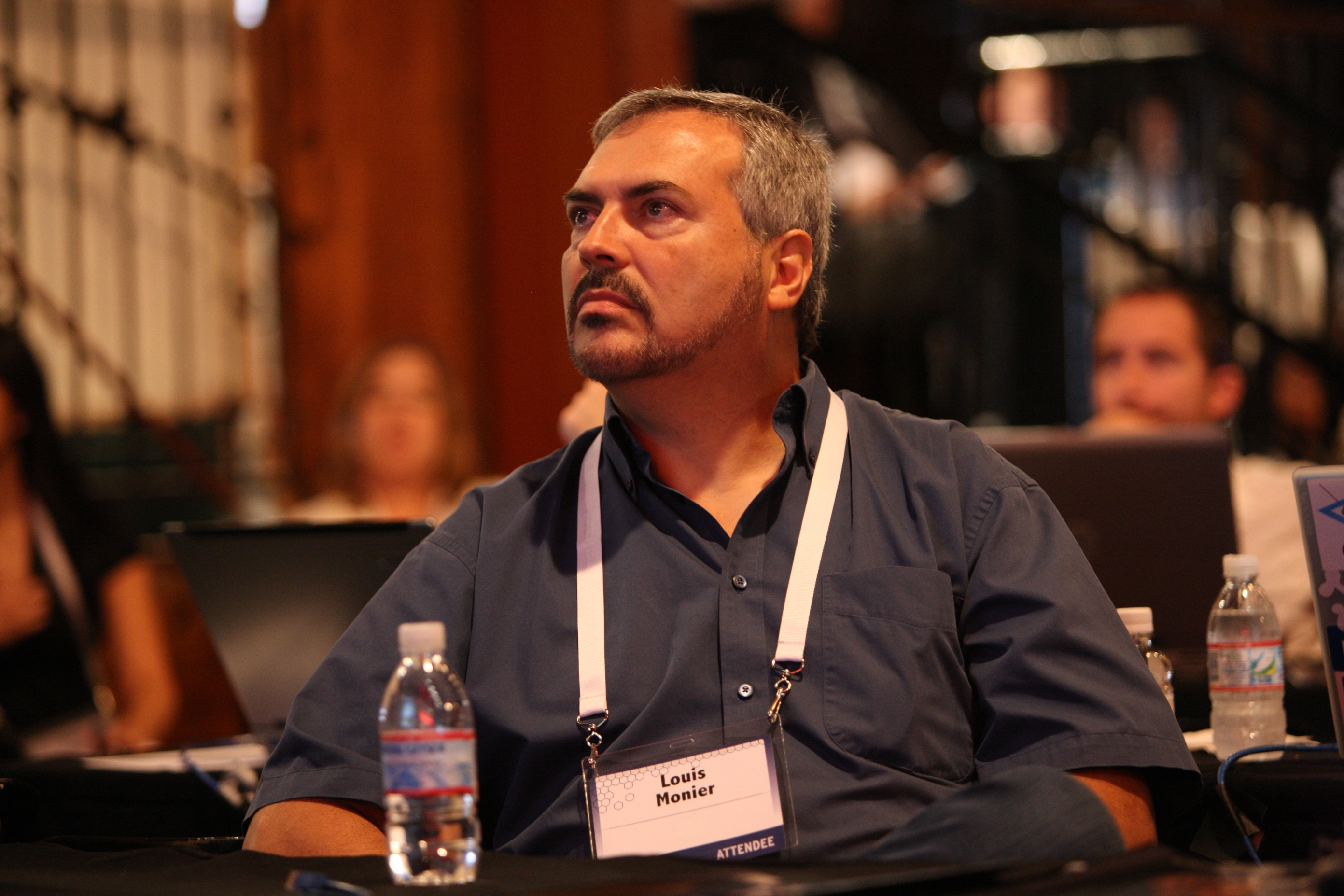 Louis Monier